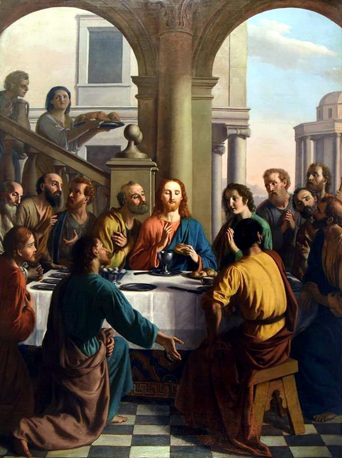 Pala dell'Ultima Cena opera di Antonio Guadagnini